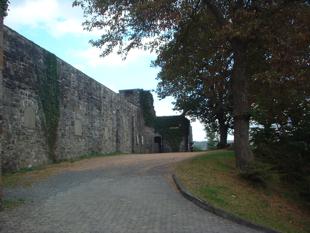 Schloss Arnsberg, eastern tower